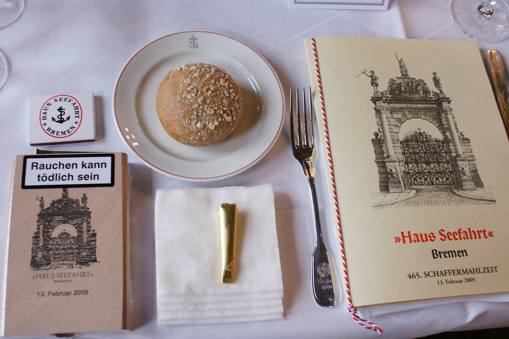 „Stimmungsbild“ von der 465. Schaffermahlzeit 2009 von Haus Seefahrt in der Oberen Rathaushalle des historischen Rathauses in Bremen, Deutschland: Teilansicht eines einzelnen Tischgedecks (vor dem Festessen).